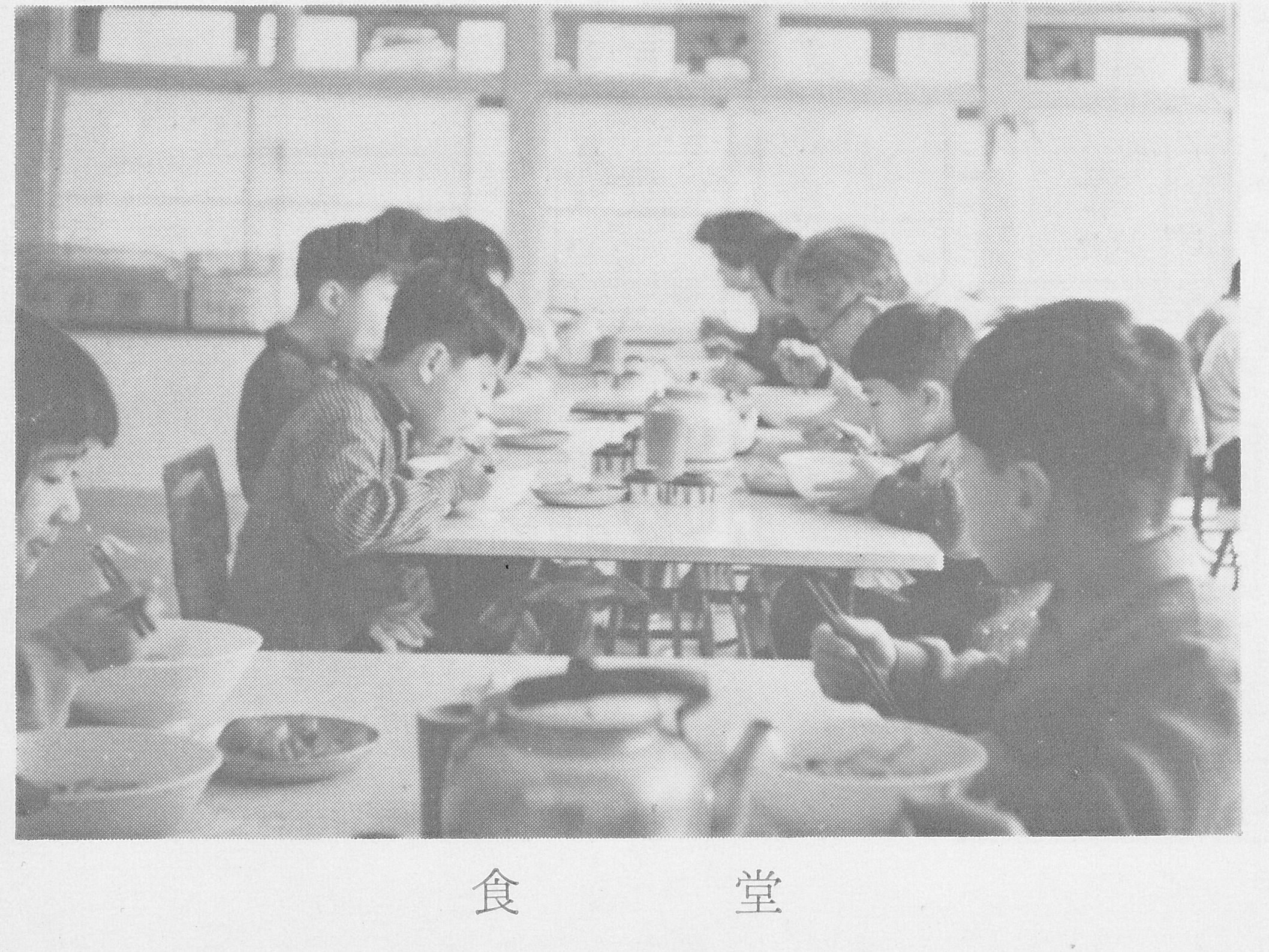 廃園となった養護施設に関する入園案内パンフレット抜粋